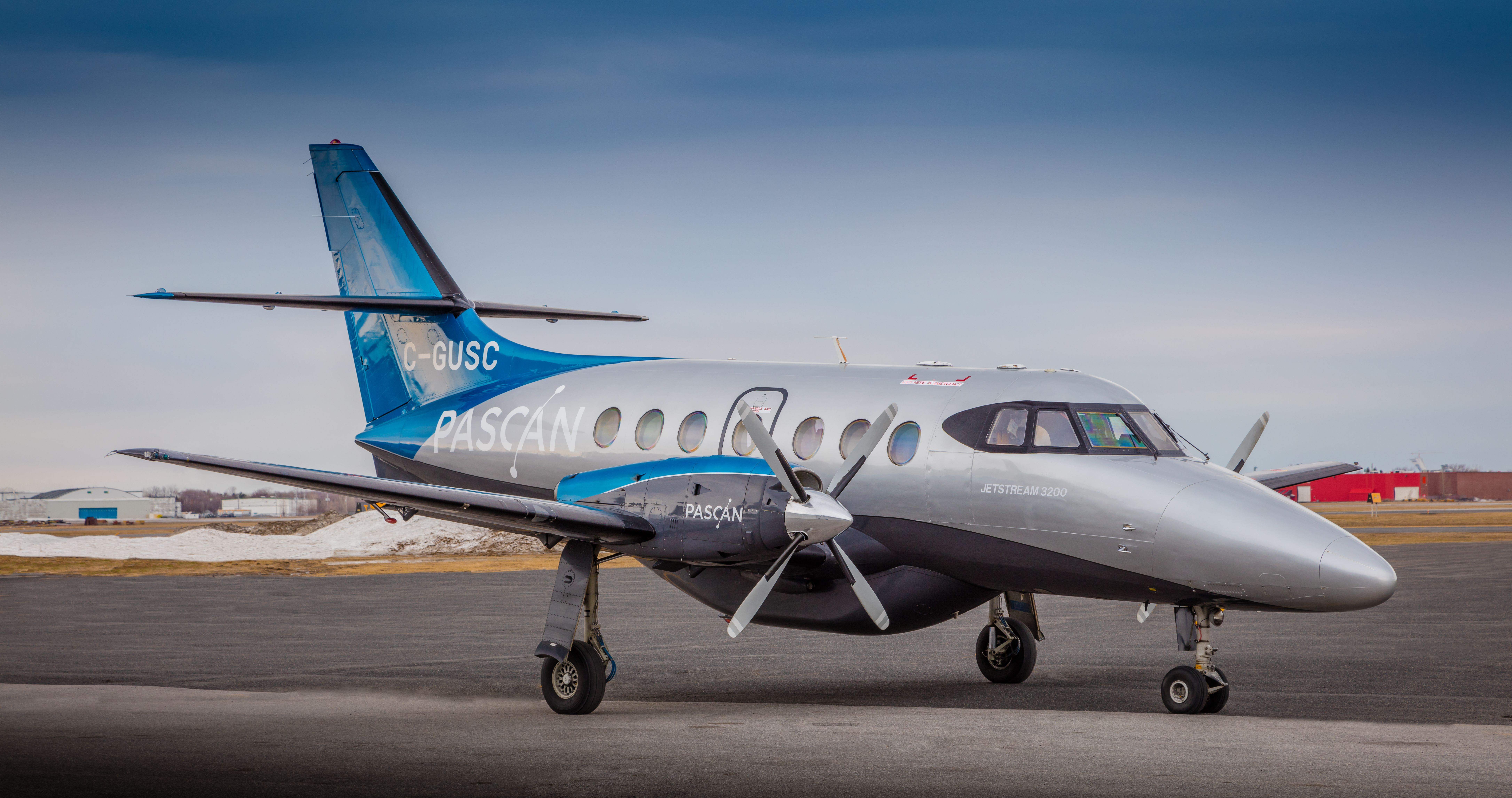 British Aerospace Jetstream 32